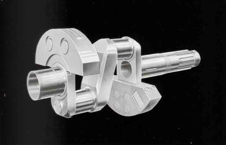 Vilebrequin 14AA avec amortisseur Sarrazin